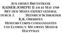 Rekpnstrukcija mermerne ploce iz podzemlja Petrovardisnje tvrdjave. Autor: Nenad Seguljev